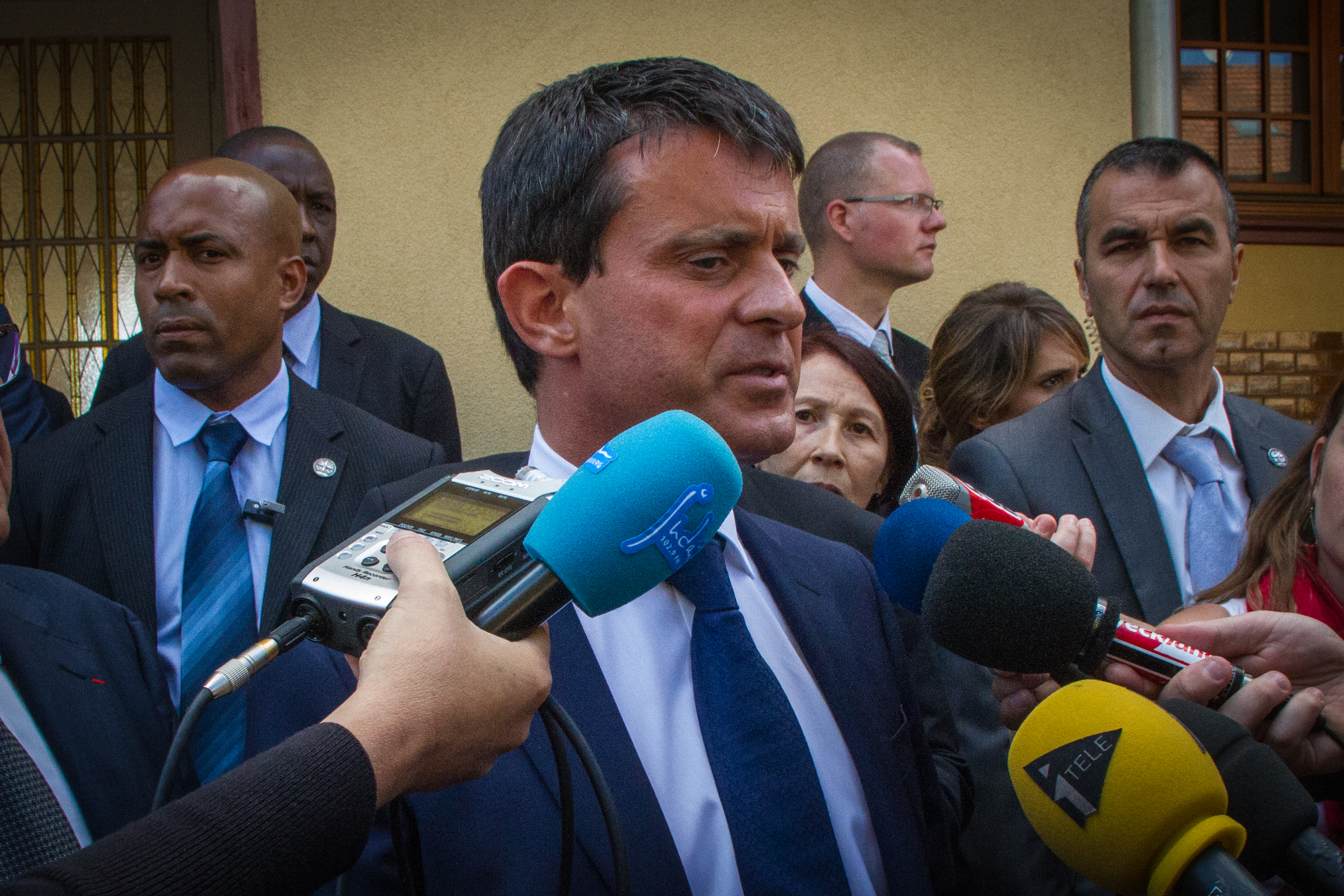 Point presse de Manuel Valls, ministre de l’Intérieur, à l’issue des obsèques de Jean Kahn à Strasbourg.